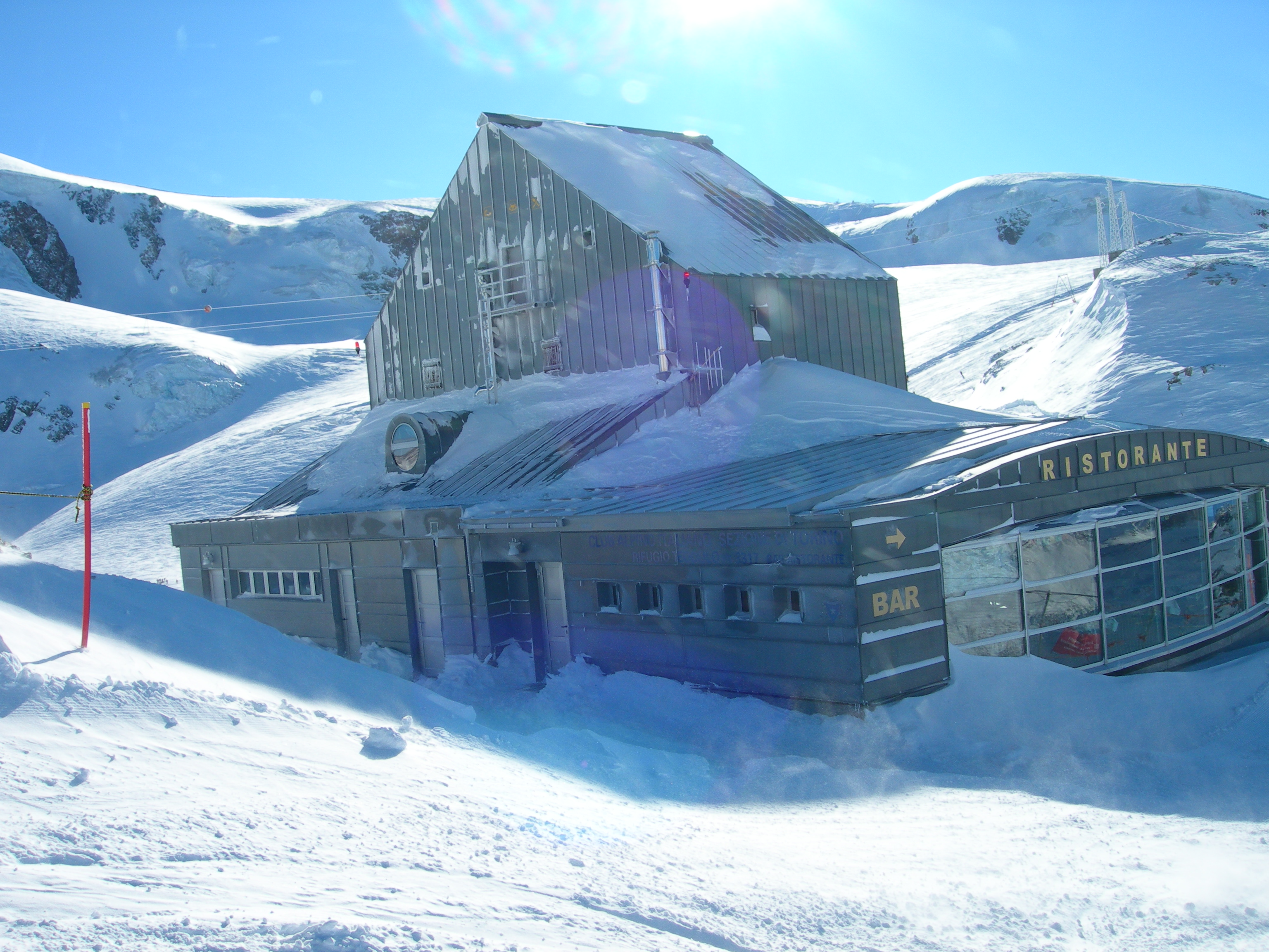 Maxx1972, 25/01/2009 a Cervinia